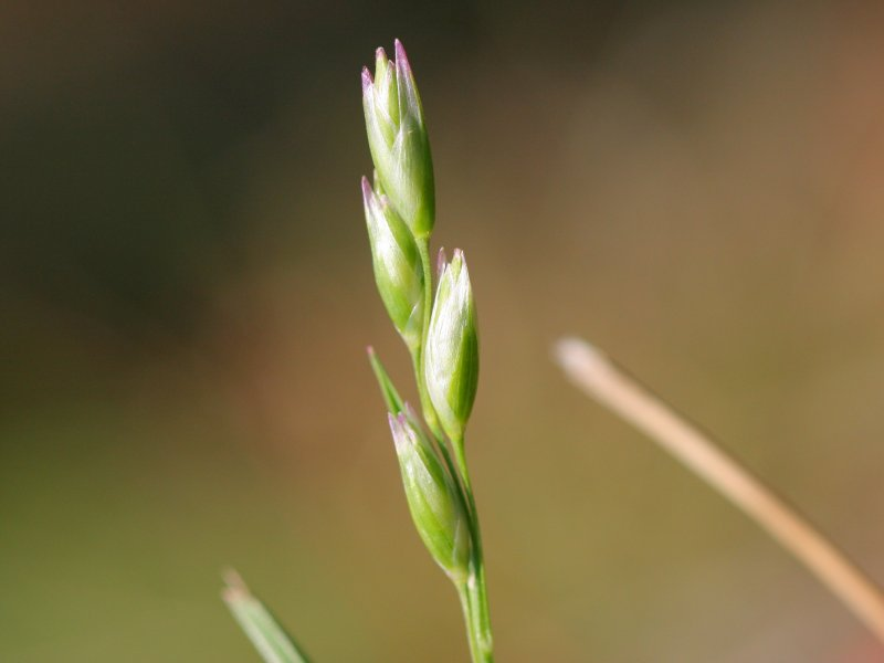 Dreizahn (Danthonia decumbens)